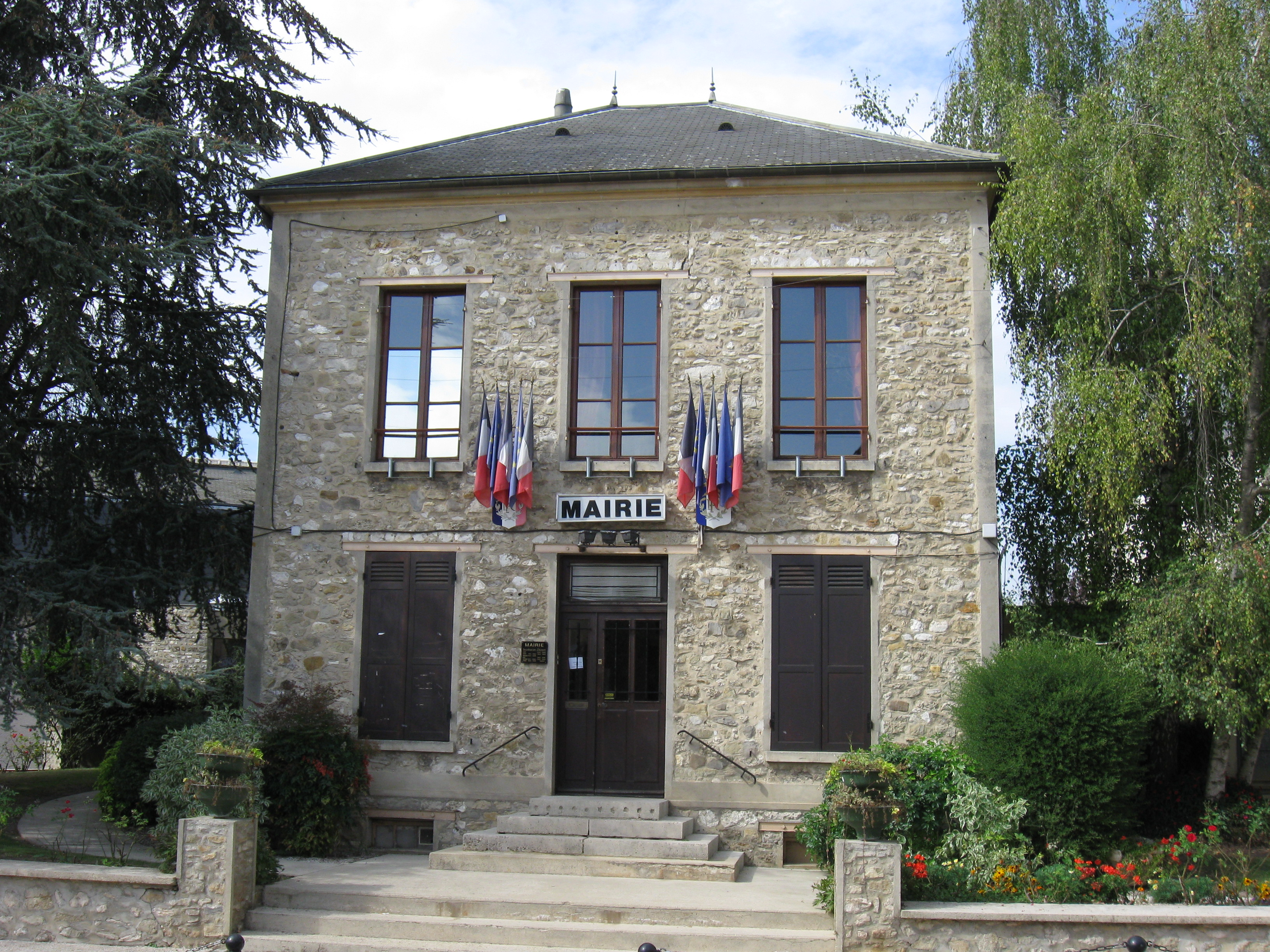 Mairie de Charny (Seine-et-Marne, région Île-de-France).